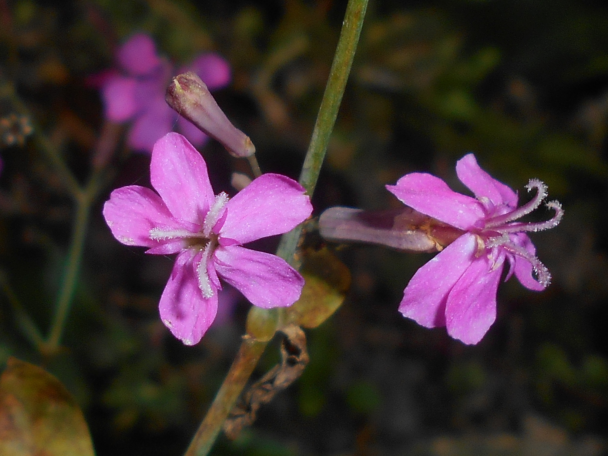 Lepnica litewska (Silene lithuanica), Ogród Botaniczny UMCS w Lublinie.